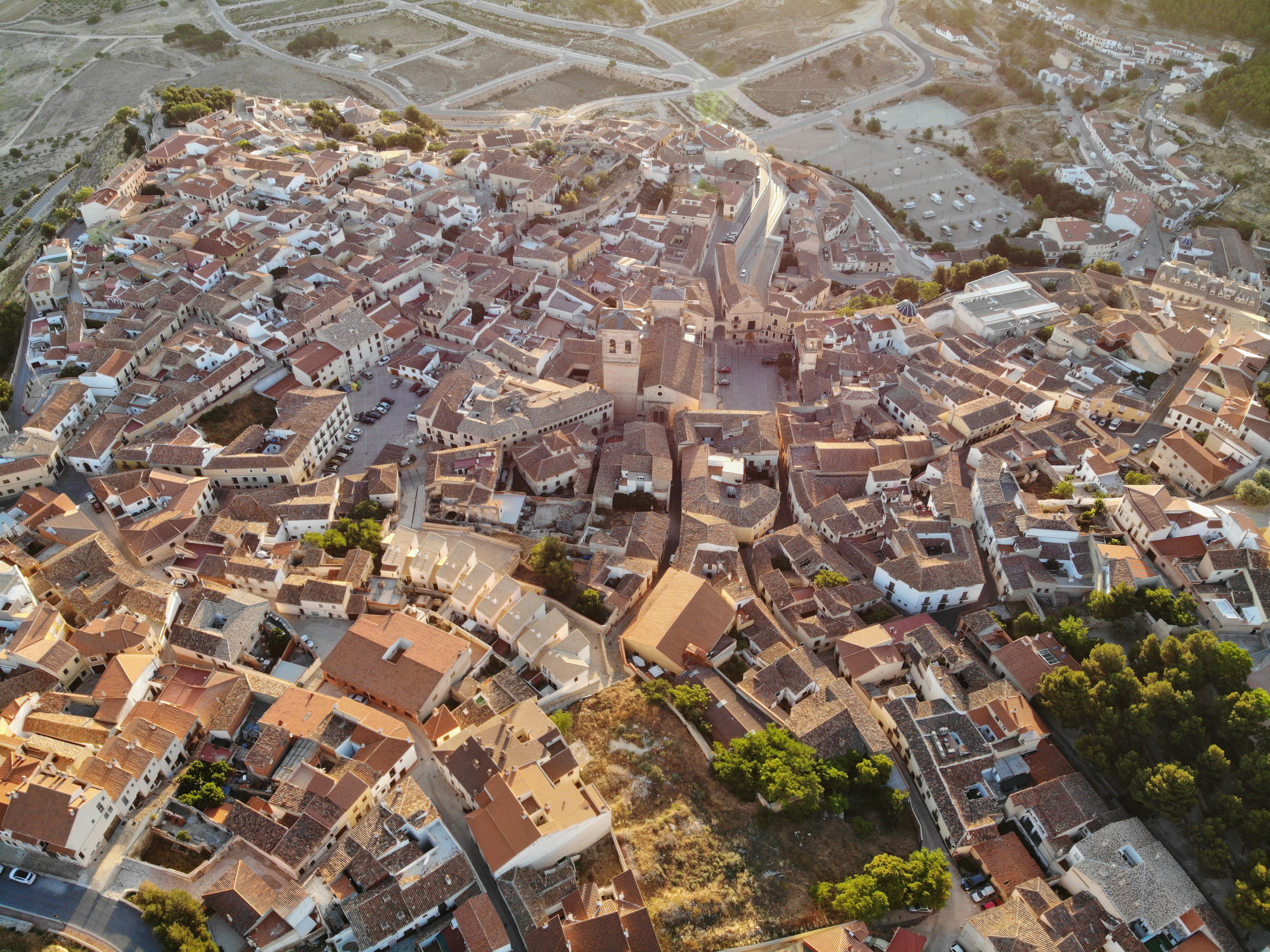 Съёмка с дрона